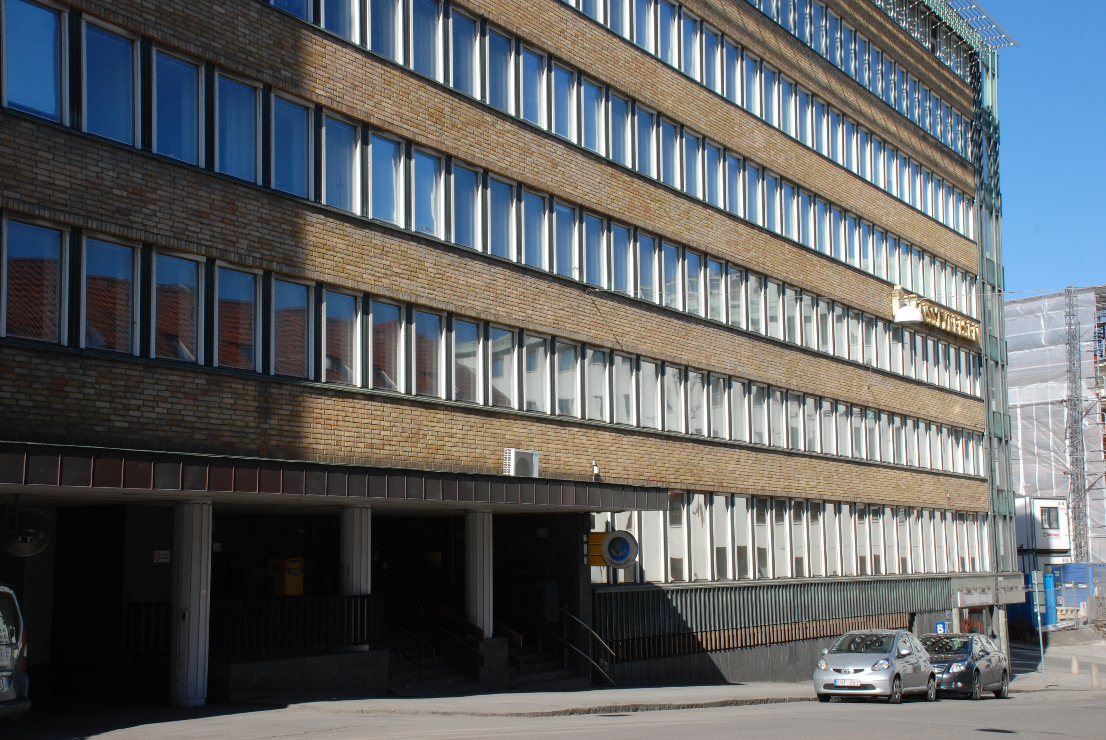 Ekelundsgatan 1-3 i Göteborg sedd mot Otterhällegatan.